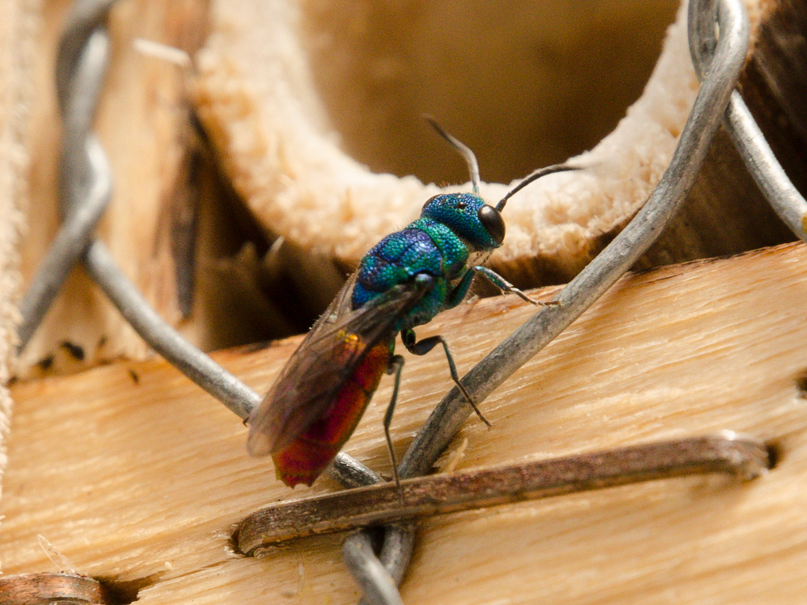 Goldwespe in meinem Garten 2019